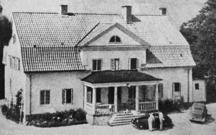 Jordanstorps säteri huvudbyggnad